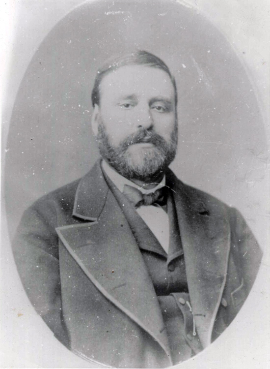 Христо Георгиев, български преприемач, дарител